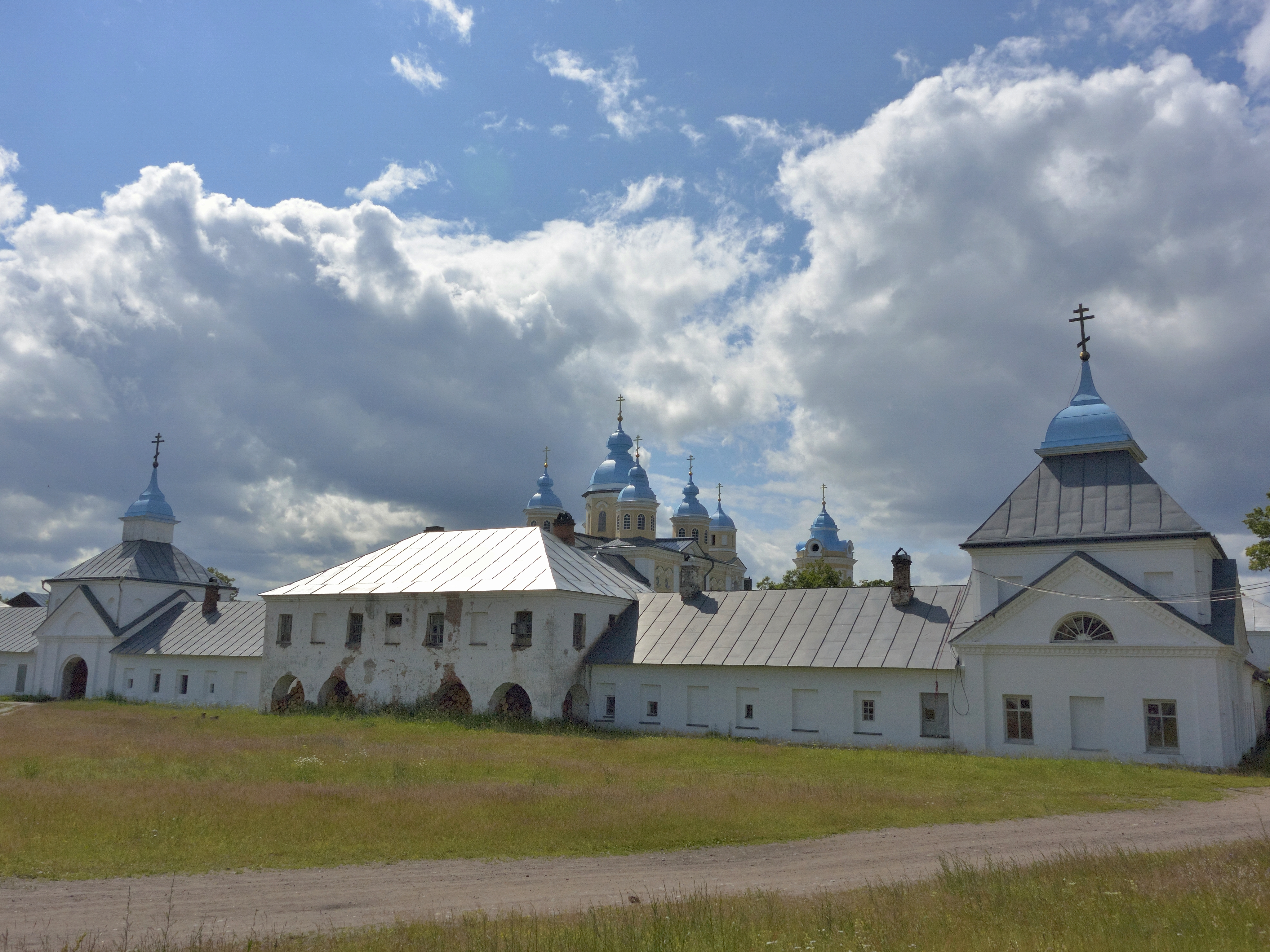 Монастырь Рождественский Коневецкий: о.Коневец, Приозерский район, Ленинградская область